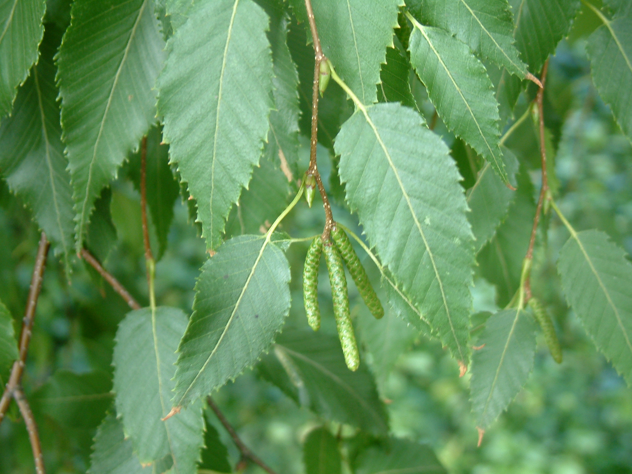 Betula albosinensis var. septentrionalis, Botanical Garden in Poznań